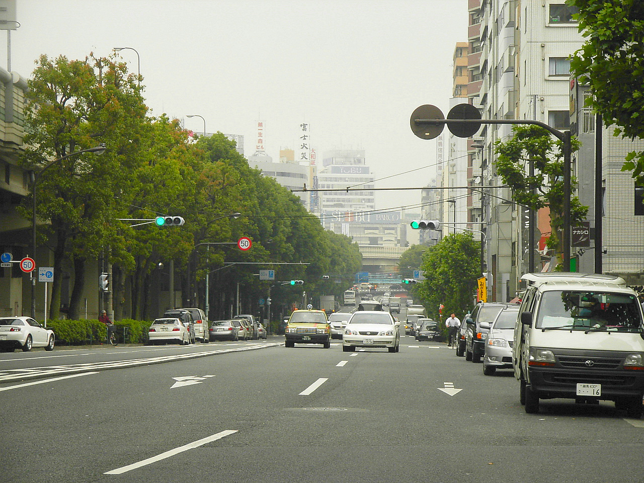 Tokyō Prefectural Road 435, Otowa-Ikebukuro Line. Ikebukuro, Tokyo, Japan.